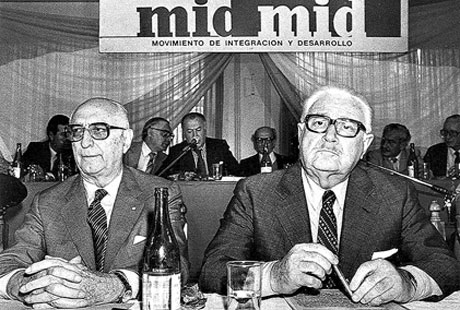 Foto del expresidente Arturo Frondizi (izquierda), junto a Rogelio Frigerio (a la derecha), durante una reunión del MID.